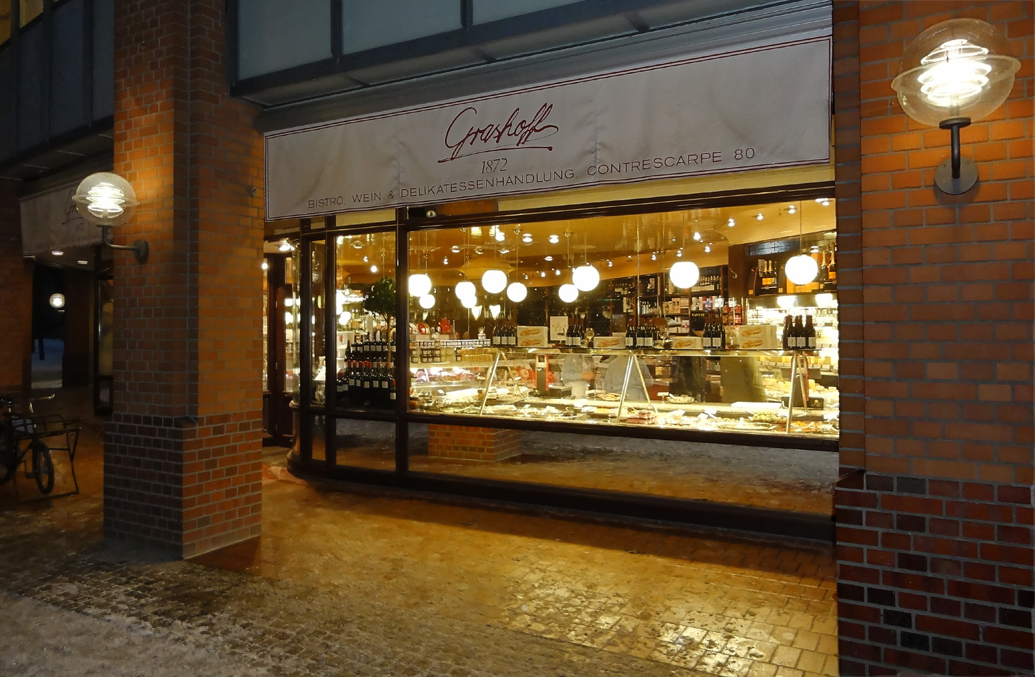 Feinkostgeschäft und Gourmetrestaurant Grashoff in Bremen, Contrescarpe 80